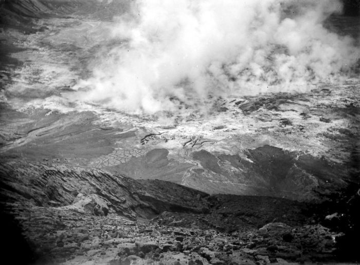 Negatief. Solfataren in de krater van de vulkaan Gunung Kelud